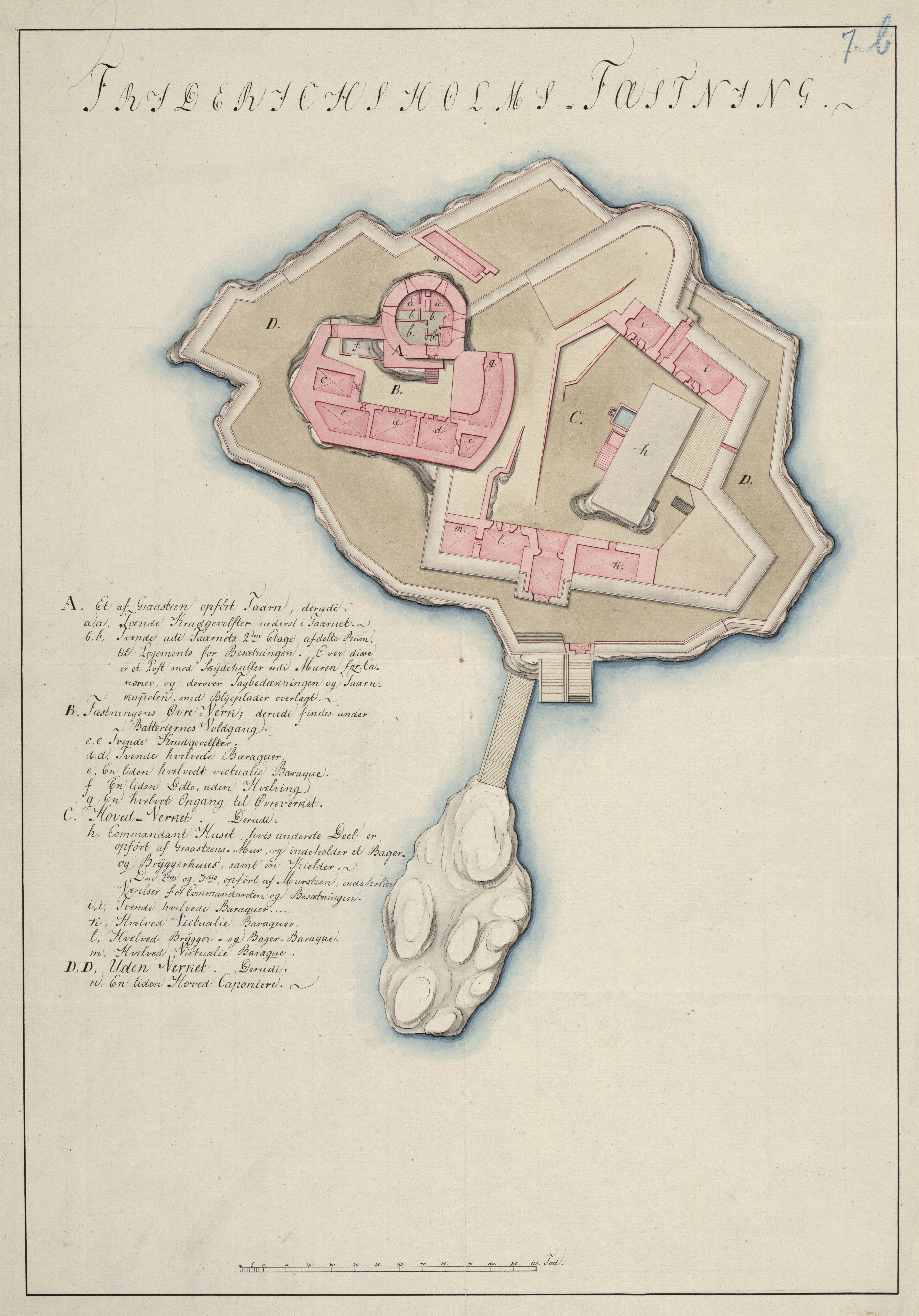 Kart fra Nasjonalbibliotekets kartsamling. Kartet er gitt ut i håndtegnet (ca 1800?) og viser Fredriksholm festning.